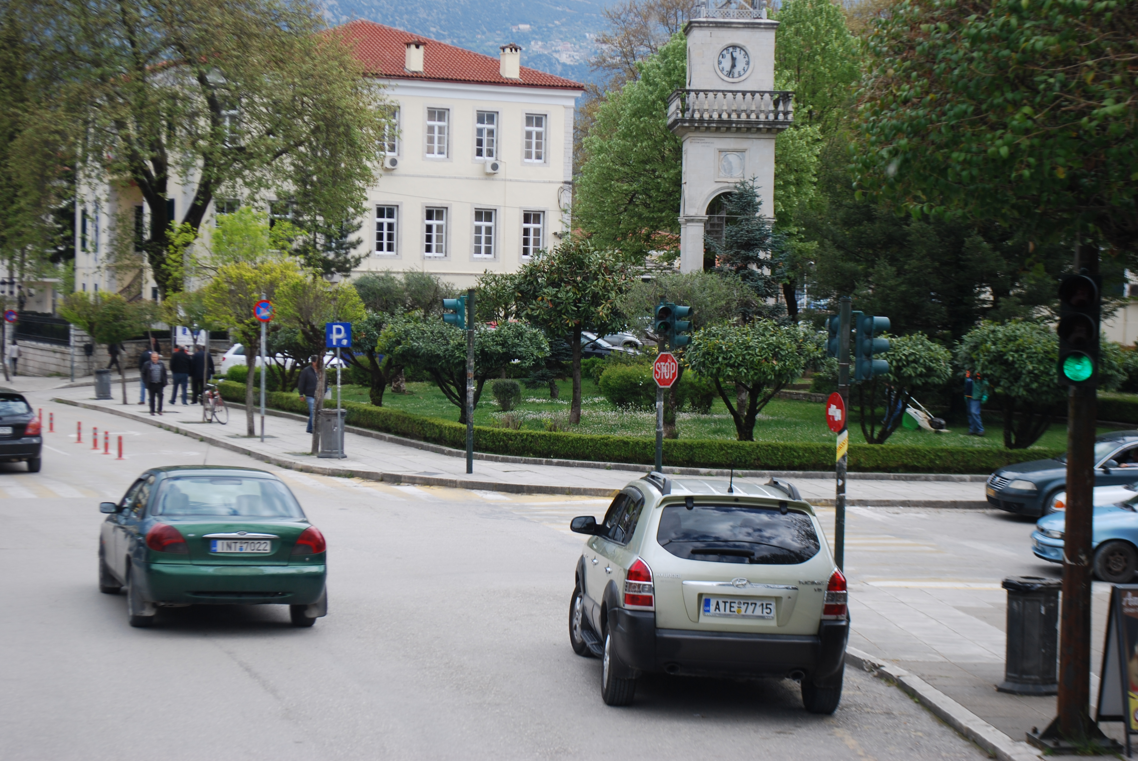 Vue de Ioannina.